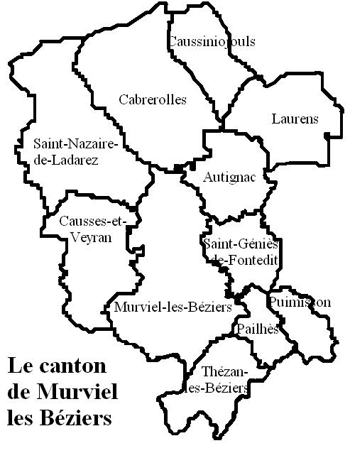 Le canton de Murviel les Béziers Image personnelle